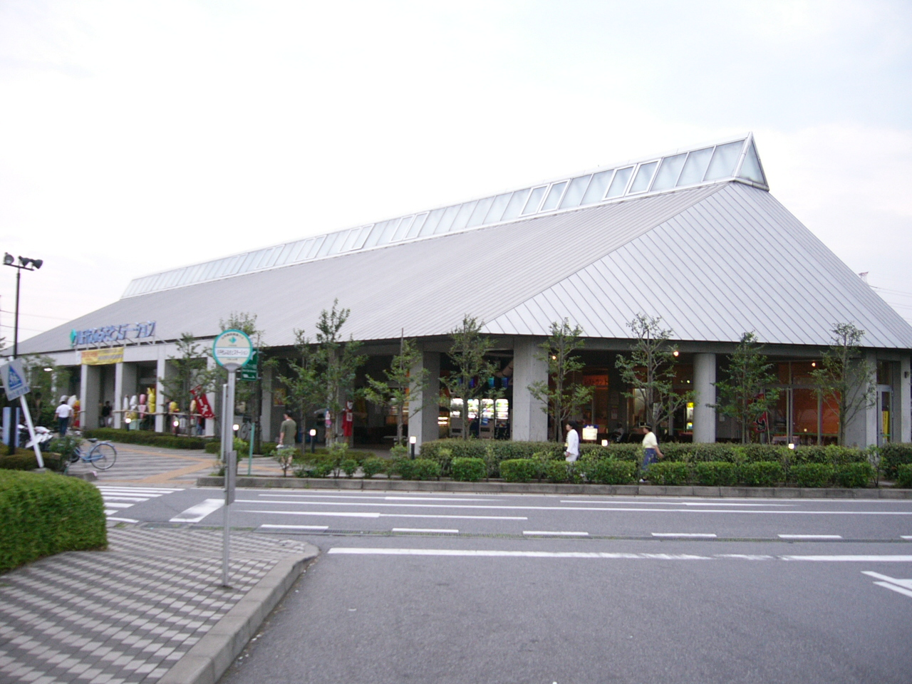 Michinoeki Yachiyo (道の駅やちよ Chiba)